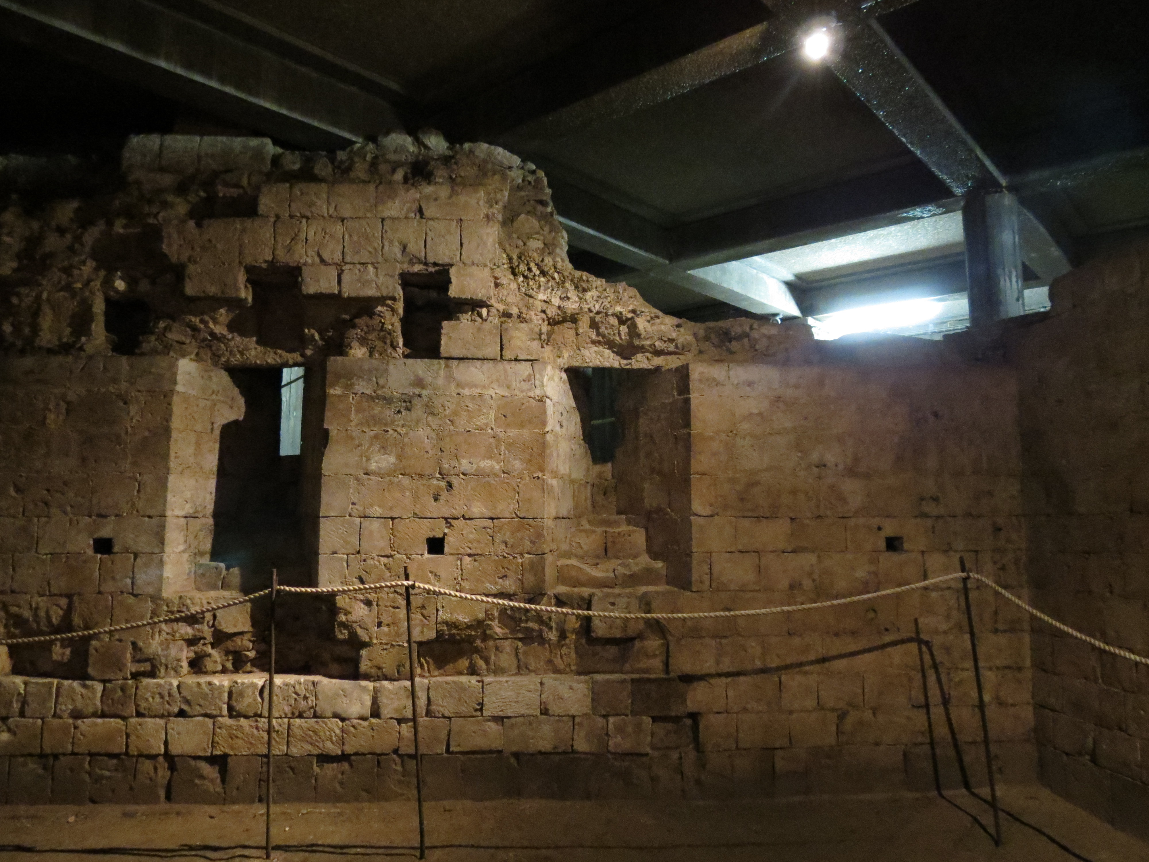 Maison sublime - mur nord intérieur